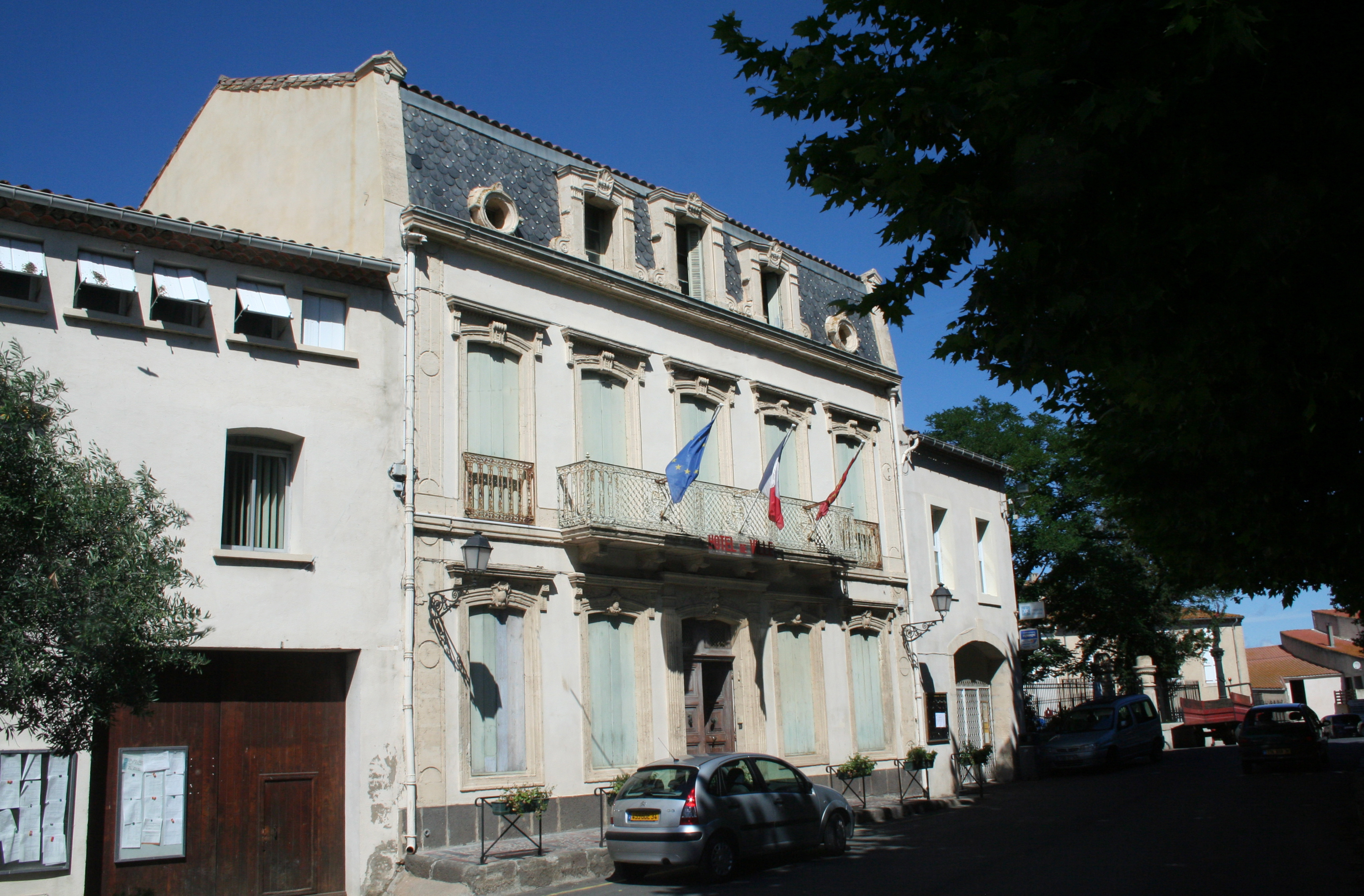 Vendres (Hérault) - mairie.